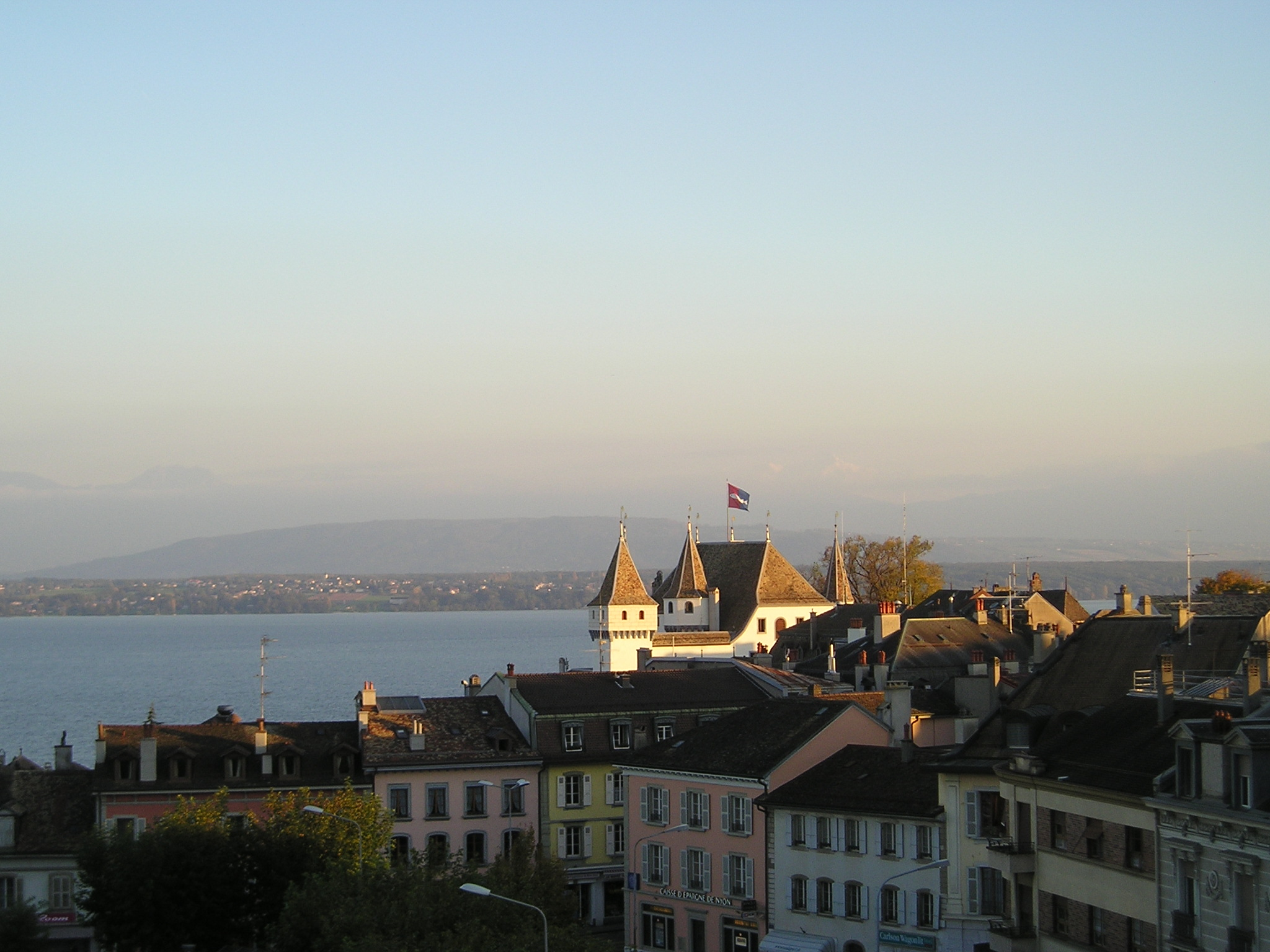 Foto della città svizzera di Nyon al tramonto (fine ottobre 2006), autore Massimo Macconi